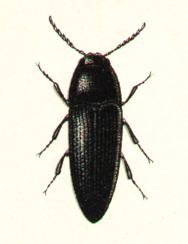 Eucnemis capucinus